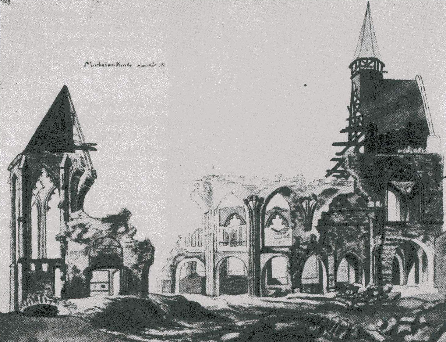 Machabäerkirche Klein, Sicht von Norden während des Abbruchs.